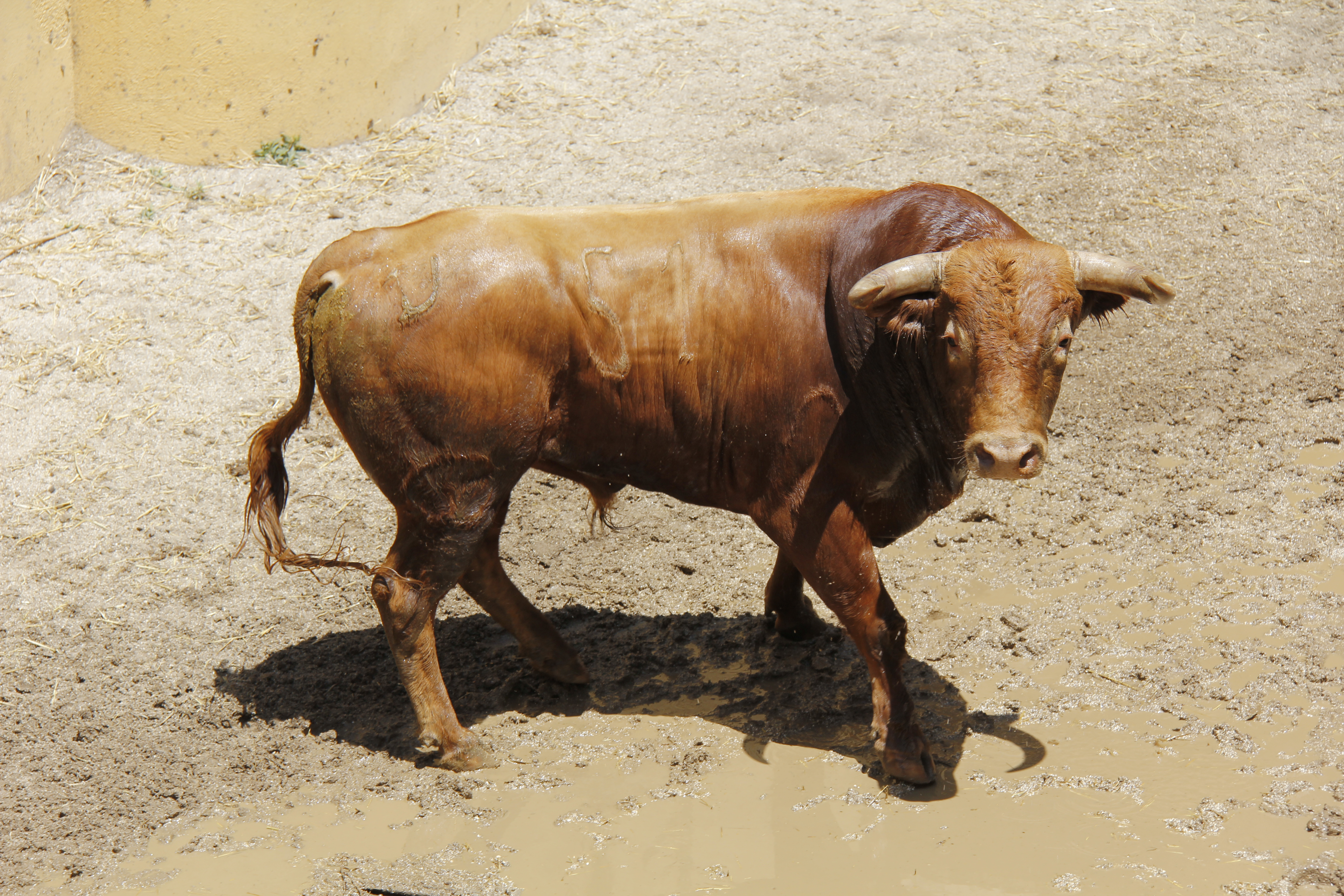 El toro Rebujino, número 51, de la ganadería de El Freixo lidiado en la Plaza de toros de Granada el 28 de mayo de 2016